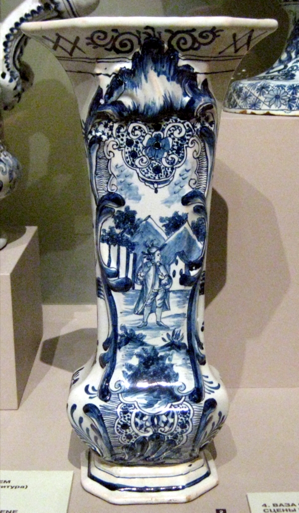 Delftware in Pushkin museum, 18 c.